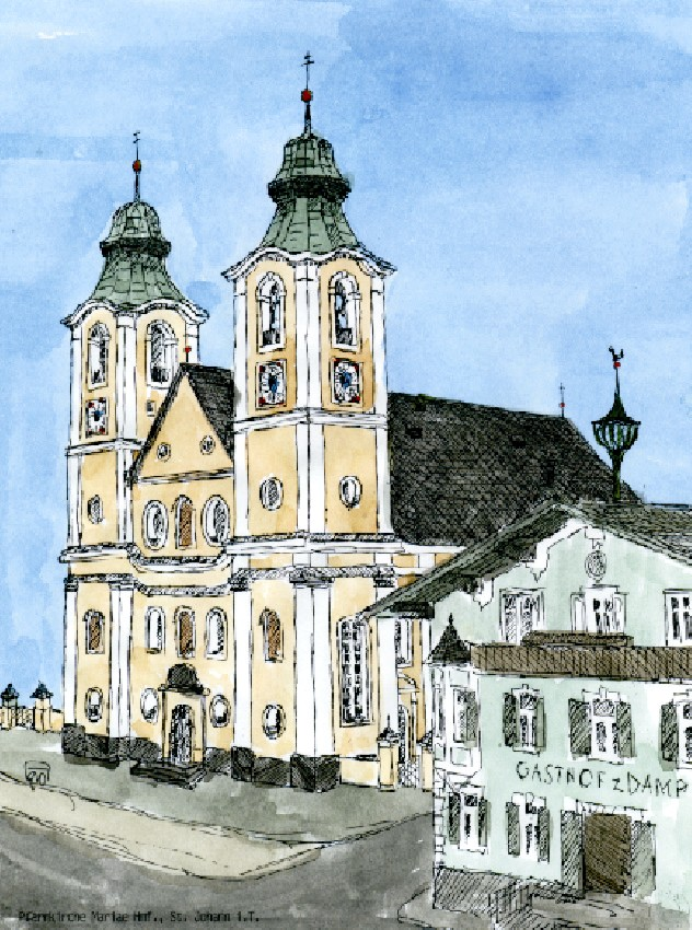 Dekanatspfarrkirche St. Johann in Tirol, Kolorierte Federzeichnung von Alois Rogenhofer